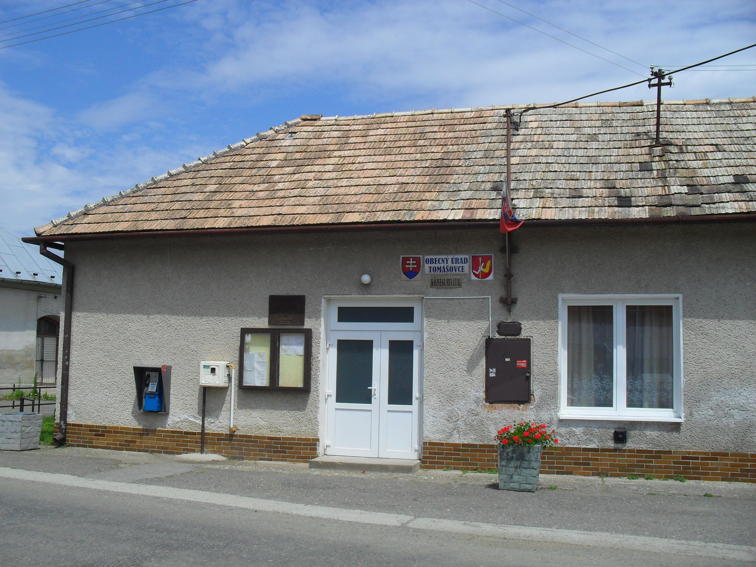 Balogtamási - községi hivatal